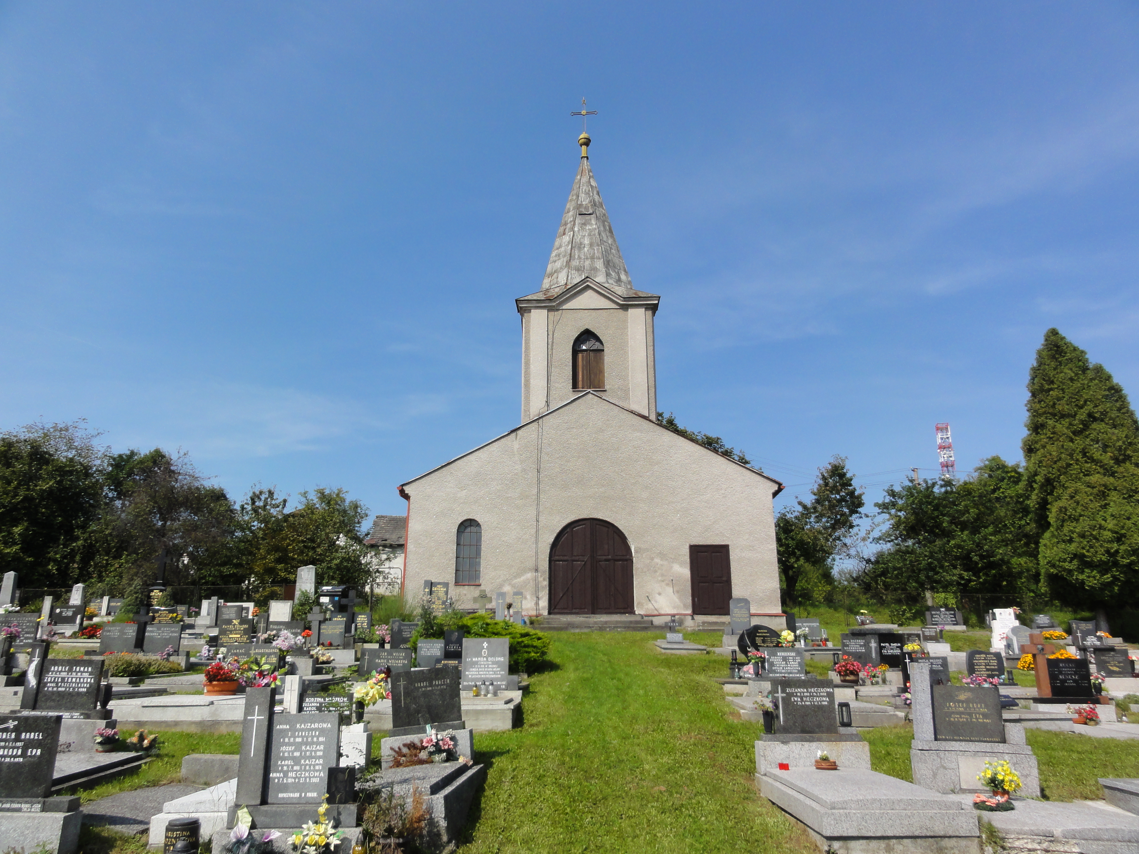 Kaplica cmentarna w Mistrzowicach